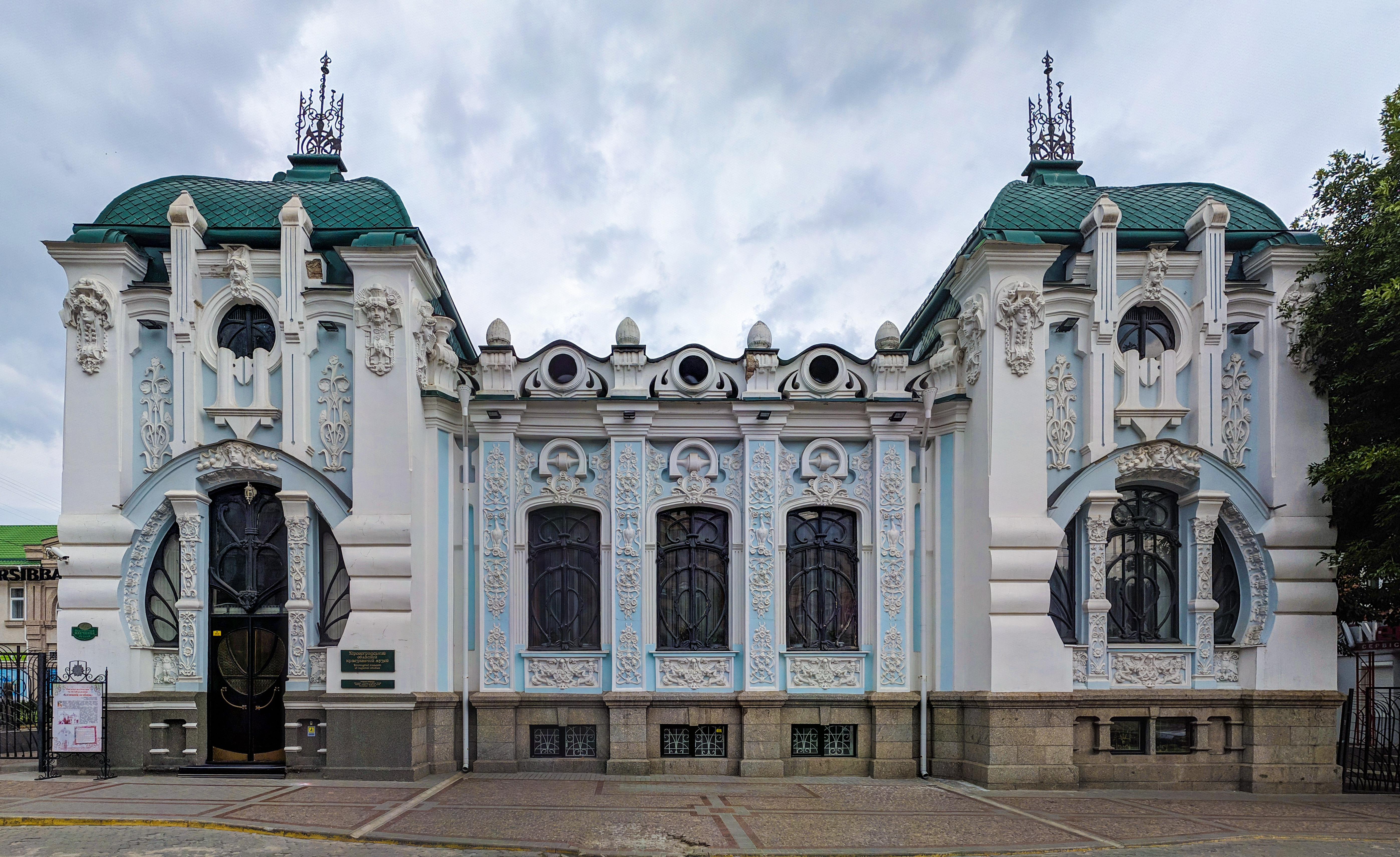 Особняк Барського, Кропивницький, вул. Арх. Паученка (Дворцова), 40